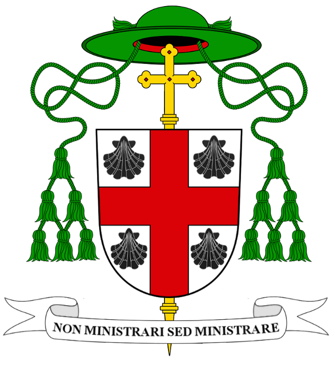 Znak biskupa Jacoba van der Oorda